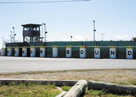 Honor Bound slogan at Guantanamo.